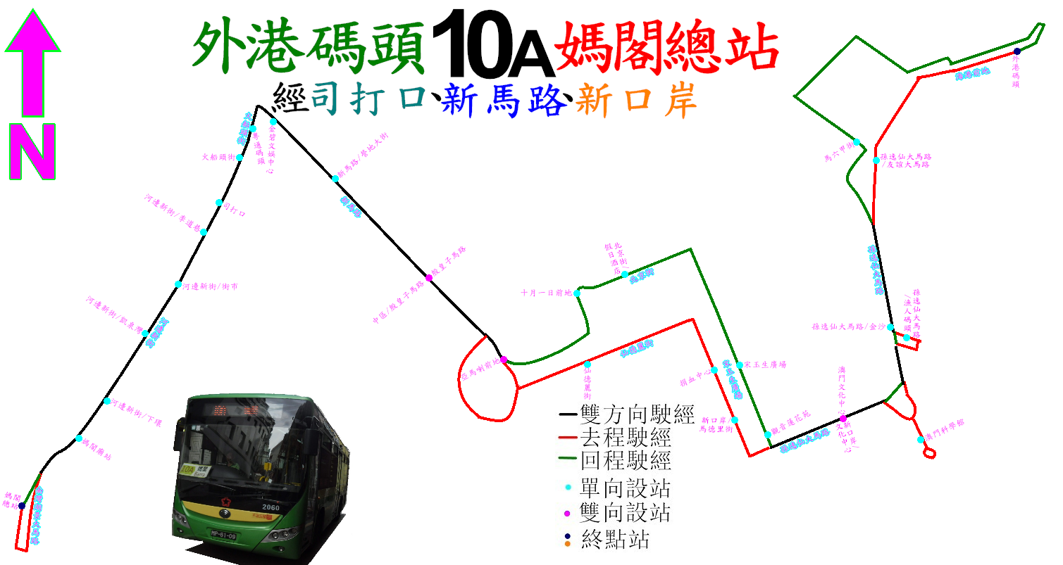 中文（香港）: 澳門巴士10A線的走線圖